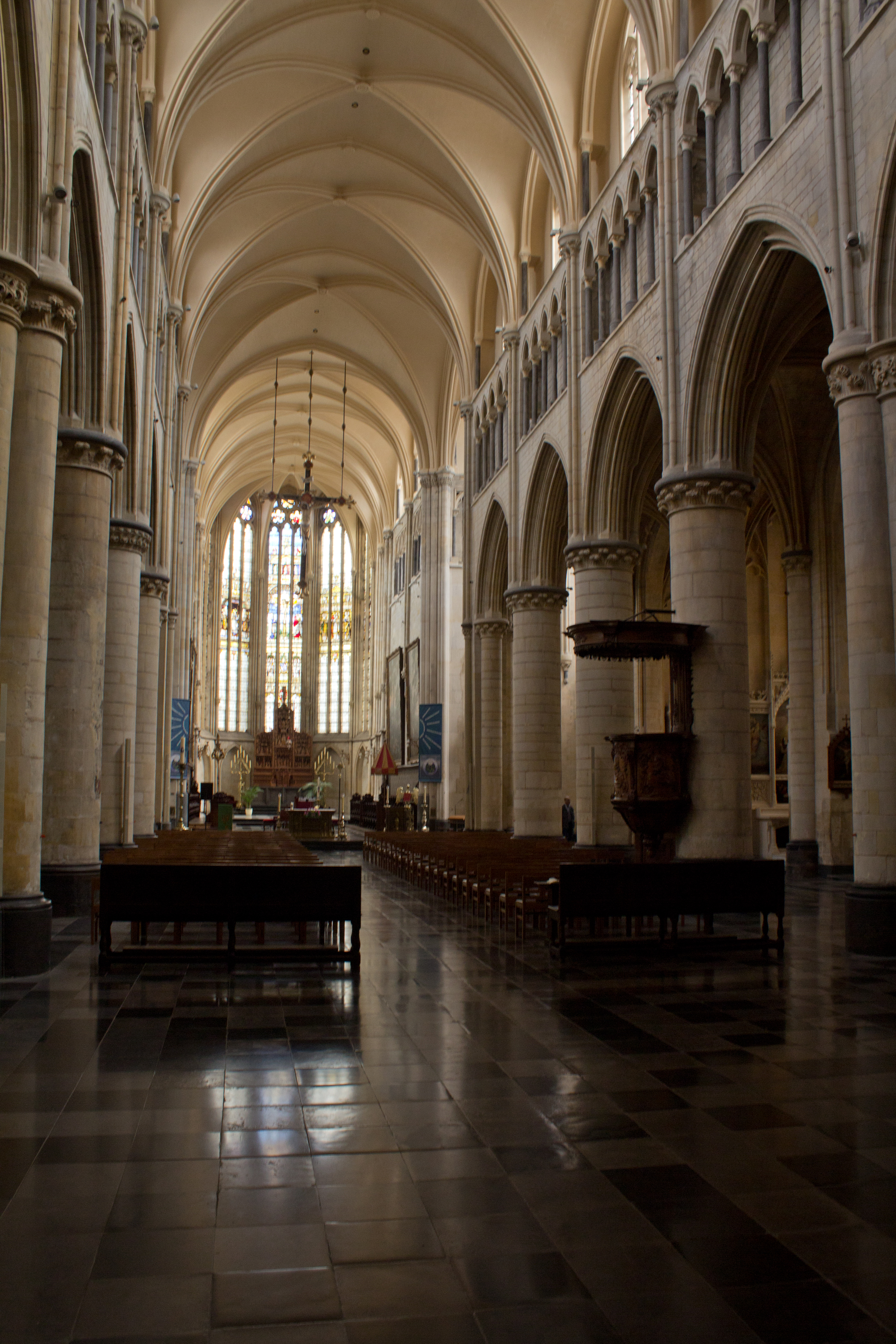 Onze-Lieve-Vrouwebasiliek, Tongeren.